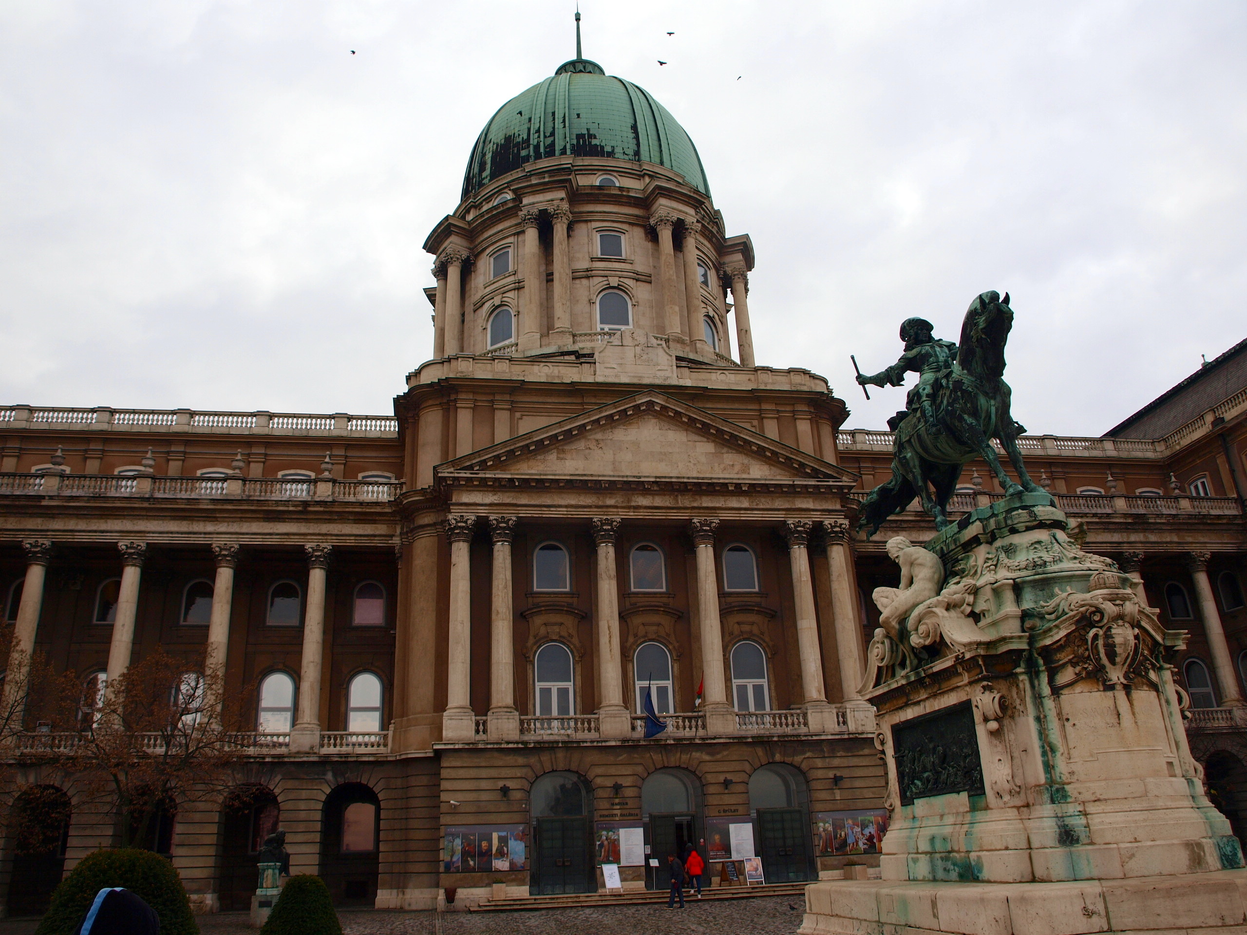 Budínský hrad - hlavní budova